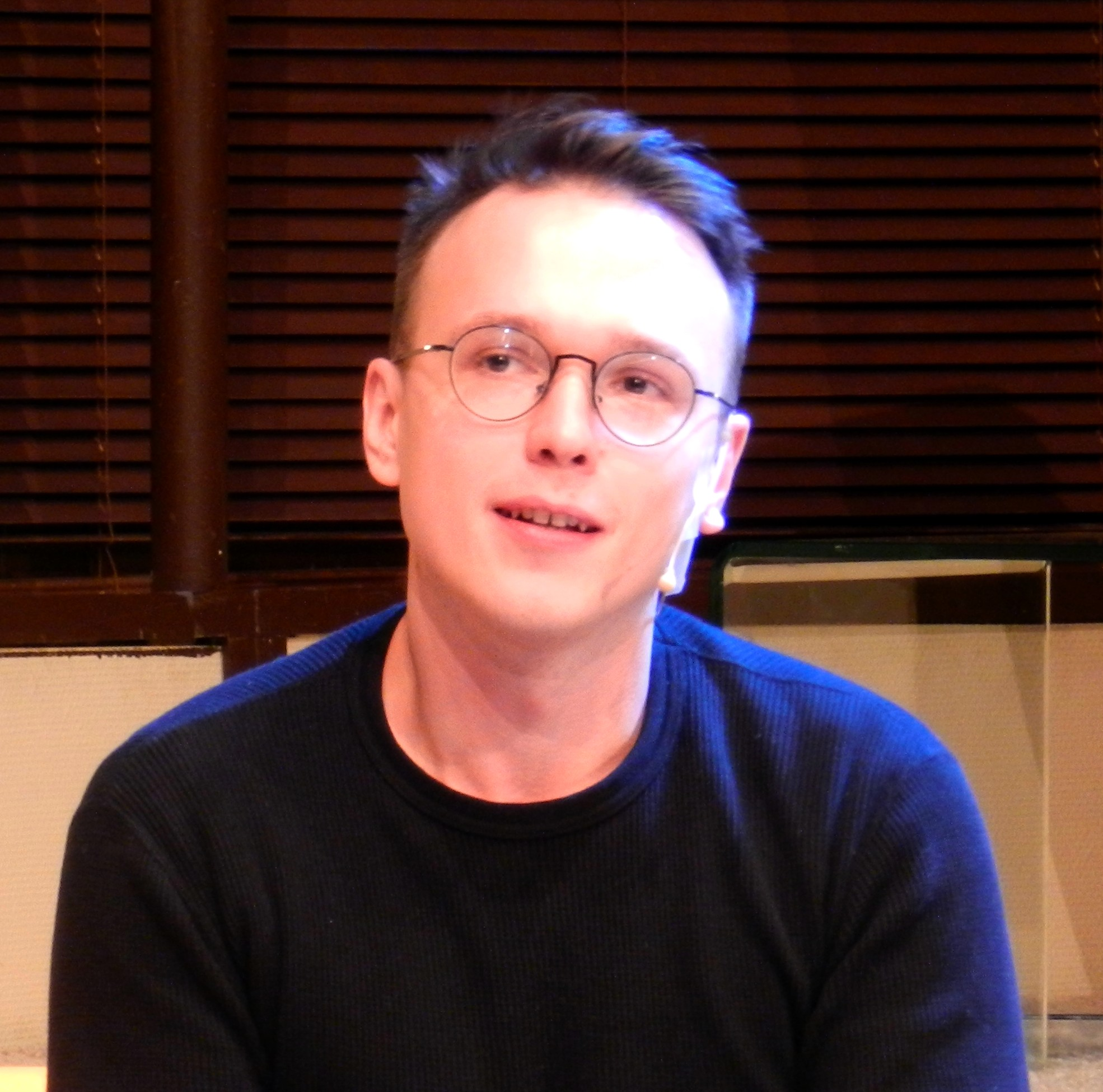 Krzysztof Gonciarz w trakcie spotkania z fanami w Teatrze 6. Piętro w Warszawie w październiku 2016 roku.